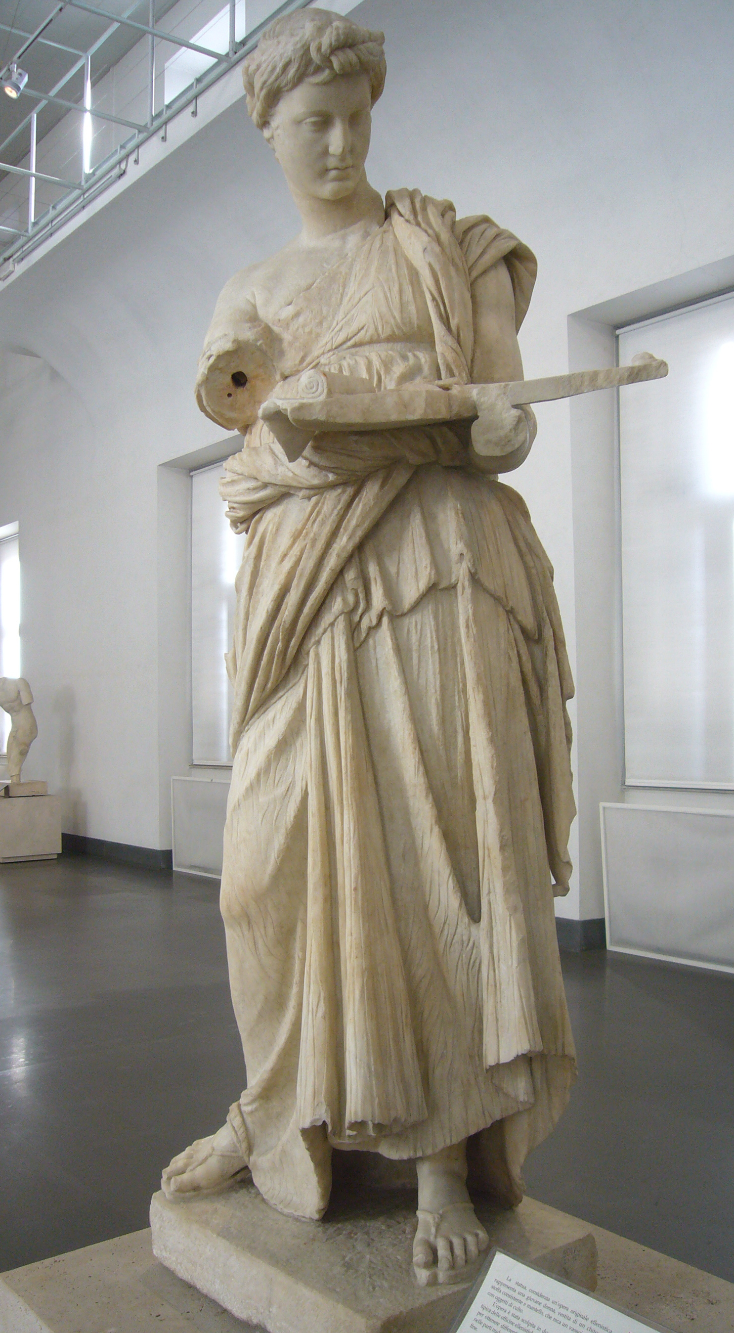 Roma, Palazzo Massimo alle Terme, Fanciulla d'Anzio